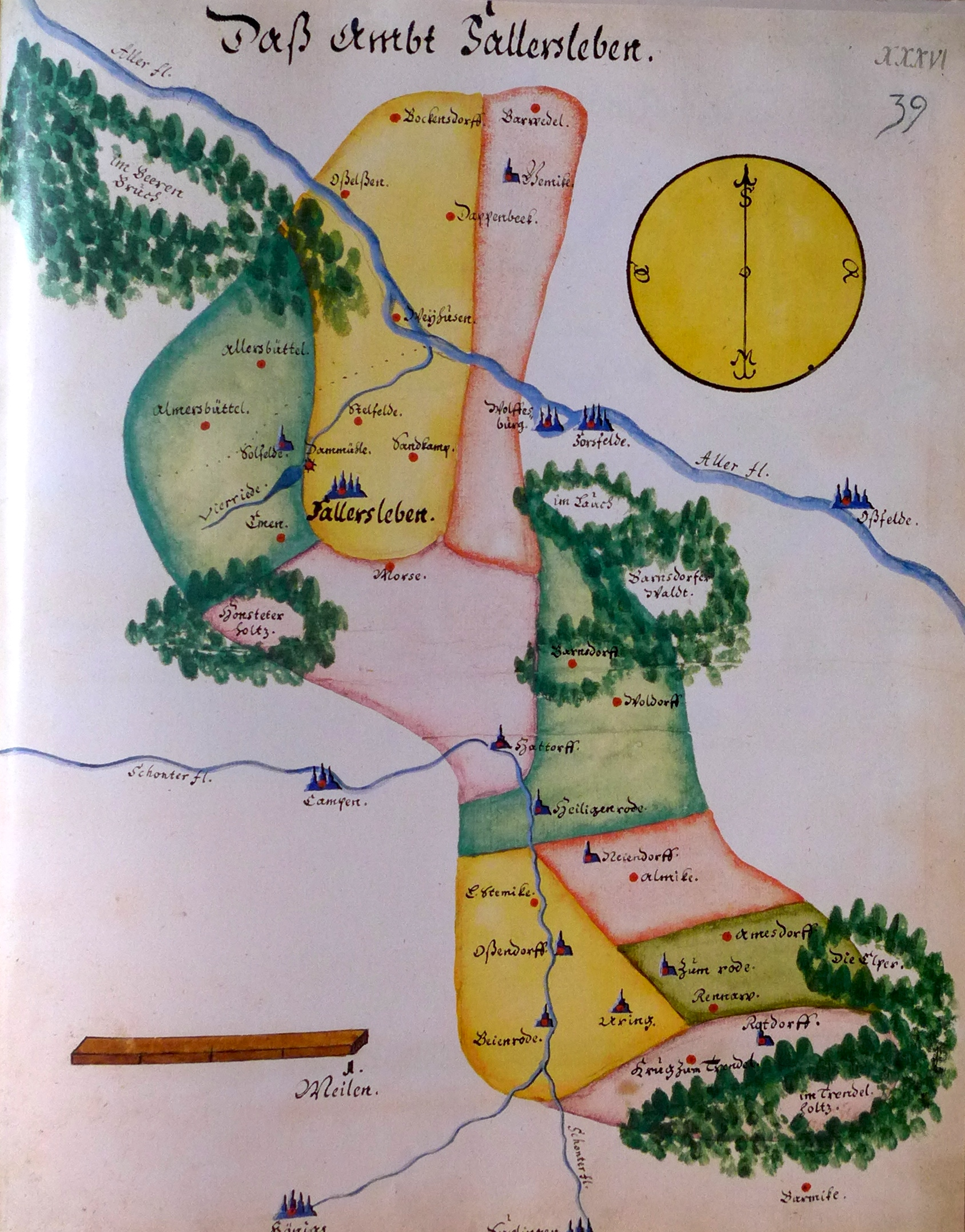 Ämteratlas des Fürstentums Lüneburg von Johannes Mellinger, um 1600 – Reproduktion der im Niedersächsischen Landesarchiv, Abteilung Hannover, lagernden Kopie um 1678 (vgl.